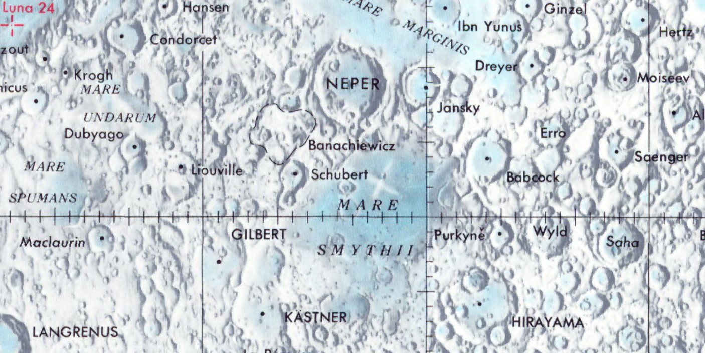 Cráter lunar Schubert. Localización. (Lunar Chart LPC1. Second Edition)